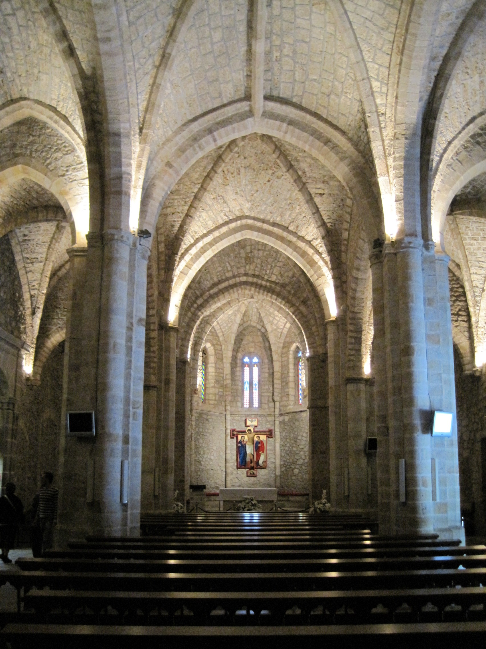 Vista de la nave central de la iglesia del monasterio de Santo Toribio de Liébana (Cantabria, España).